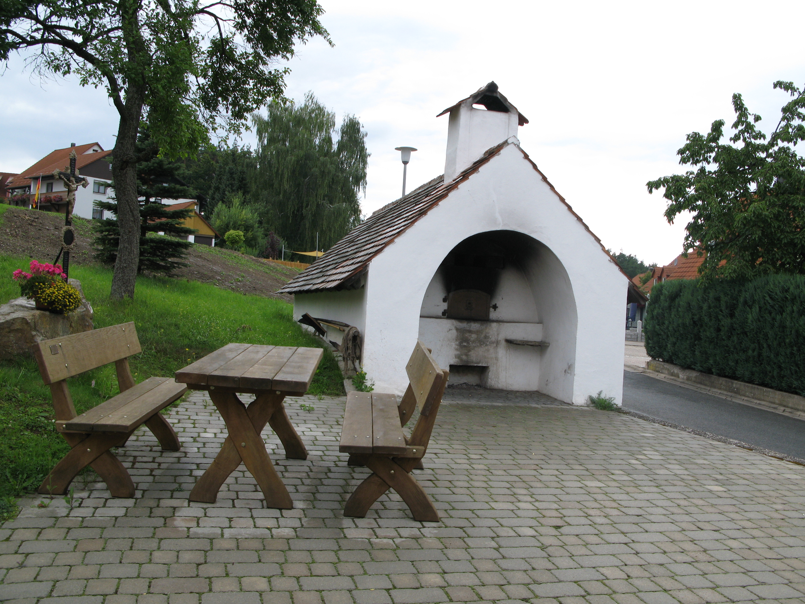 Dorfbackofen von Kirchenbirkig (Stadt Pottenstein), Oberfranken, Bayern, Deutschland